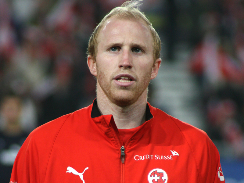 Lodovic Magnin, St. Jakob Stadion, Basel (Switzerland), Switzerland - Brasil 1:2